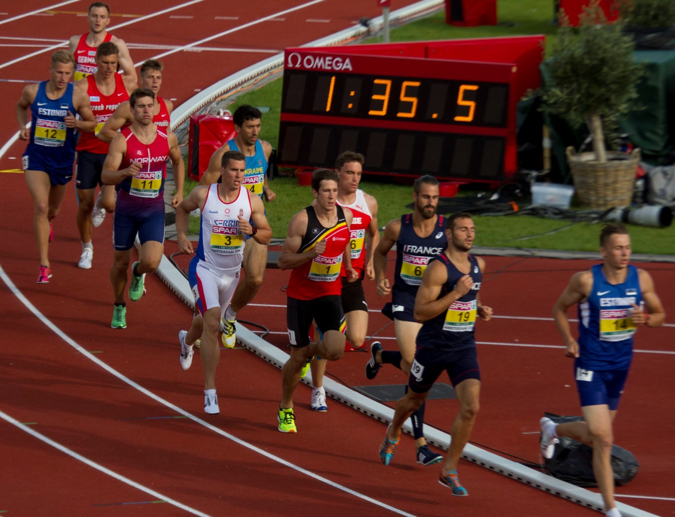 0746 1500m tienkamp